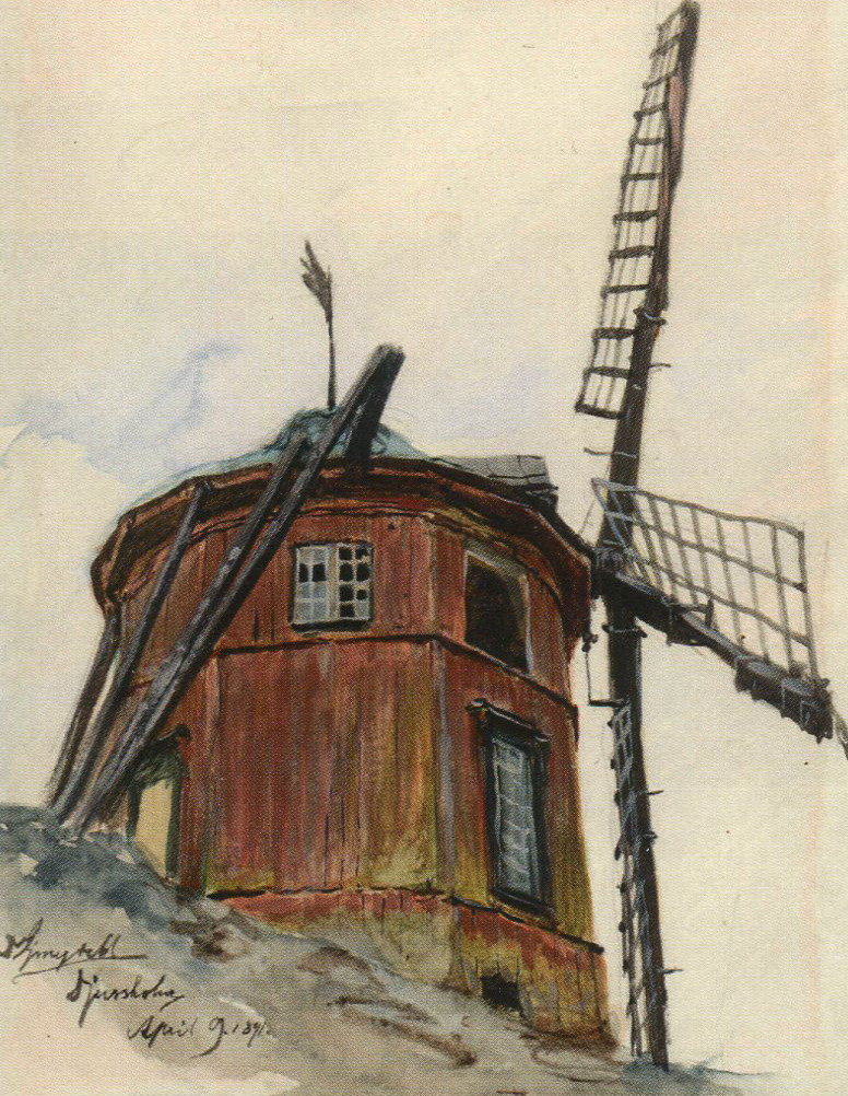 Djursholms slotts väderkvarn, målning av David Wilhelm Ljungdahl (1870-1940)